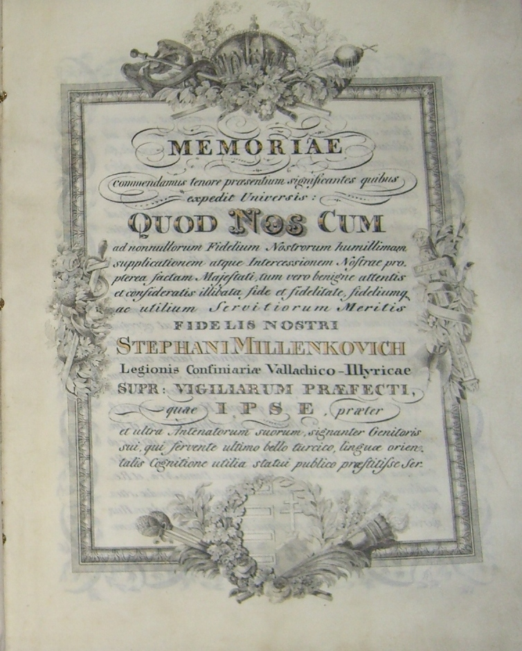 Textseite aus dem Adelsdiplom von 1835, welches durch Ferdinand I. (Kaiser von Österreich 1835-1848) in seiner Funktion als König von Ungarn für den k.k. Obersten Stephan [von] Millenkovich (1785-1863) ausgestellt wurde.